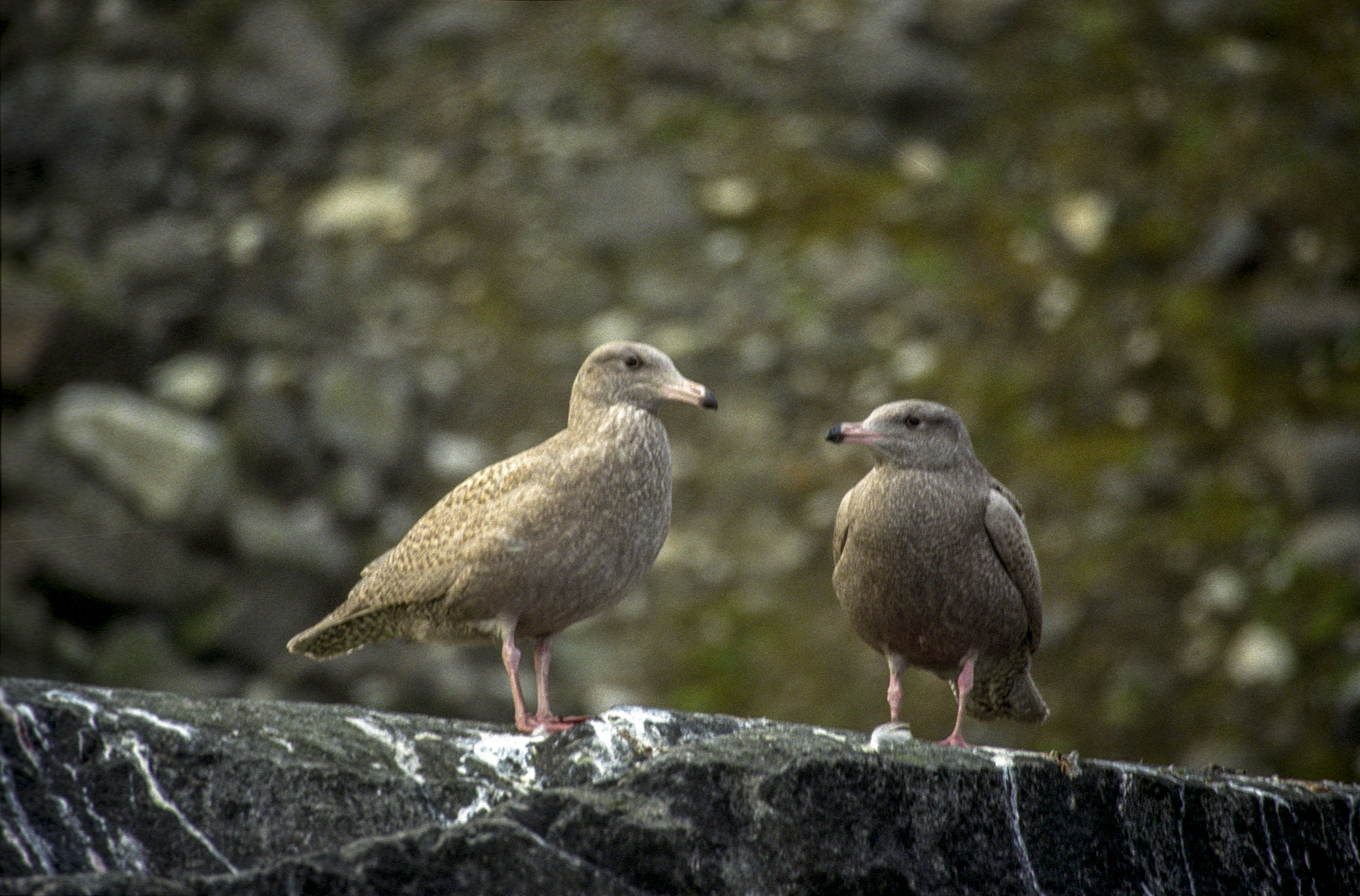 Spitsbergen, Alkefjellet, Mewa blada (Larus hyperboreus)